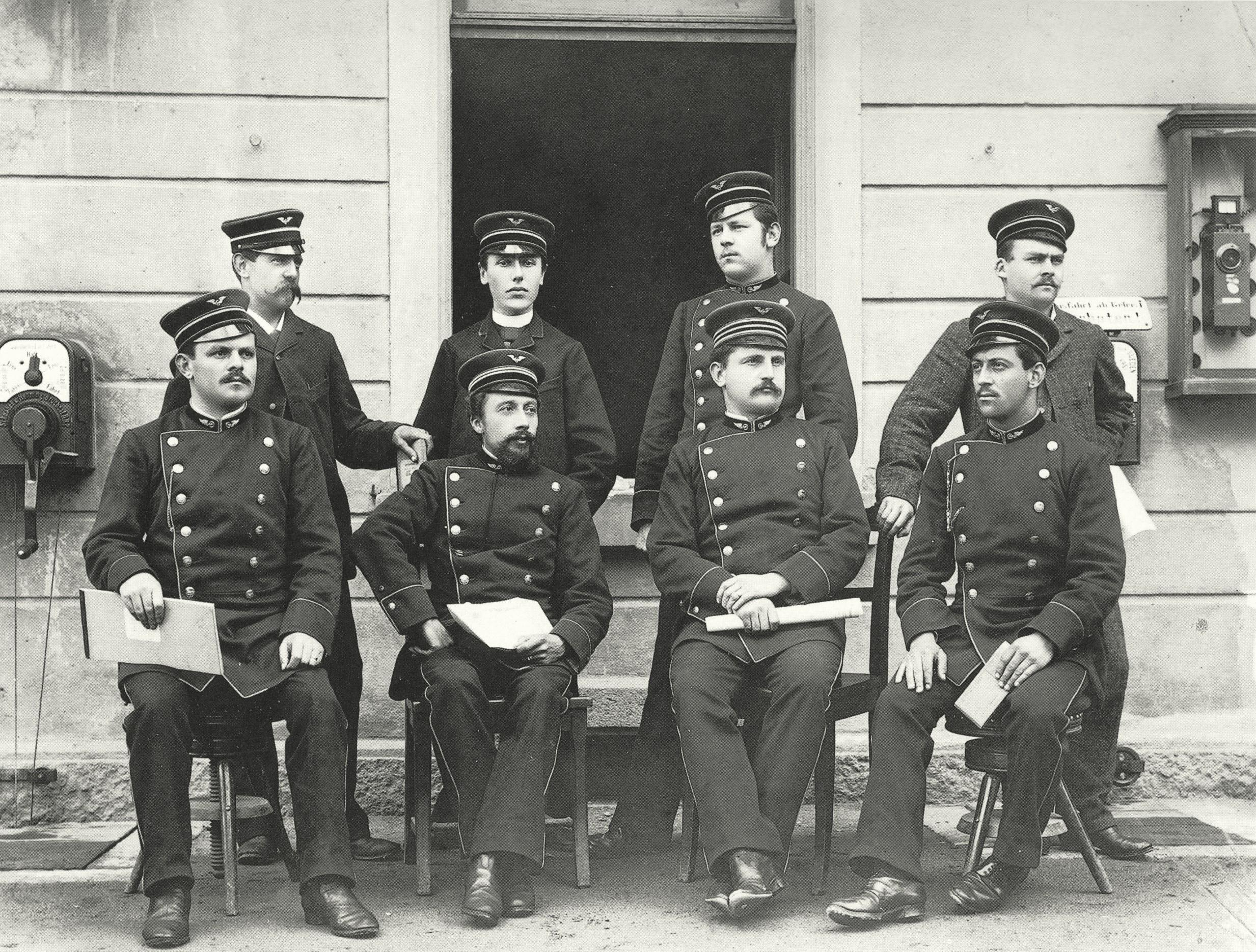 Die Stationsbeamten des Bahnhofs Erstfeld posieren in der Uniform der Gotthardbahn-Gesellschaft vor dem Fotografen.